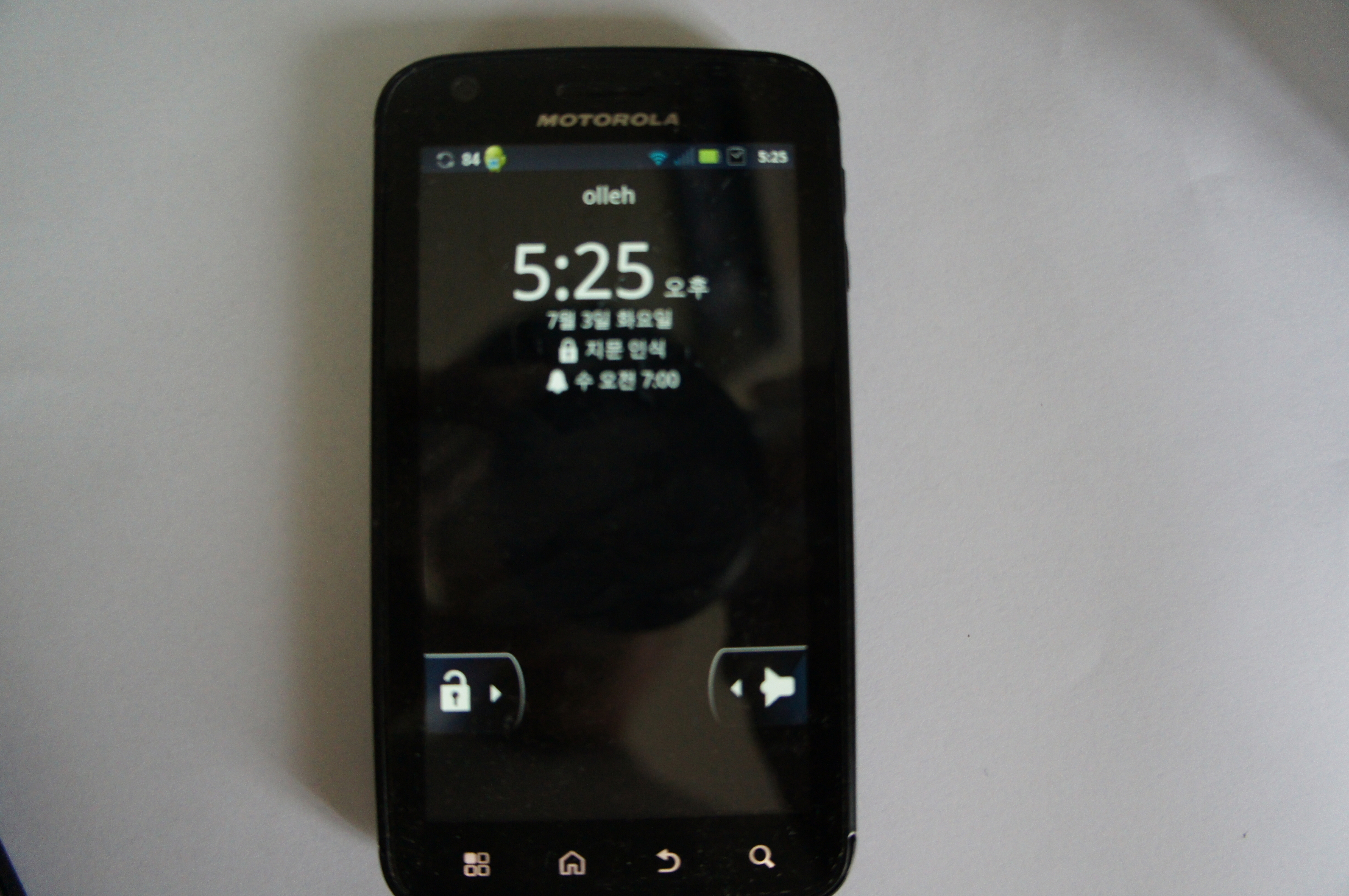 모토로라 아트릭스